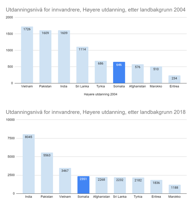 Utdanningsnivå for innvandrere, høyere utdanning